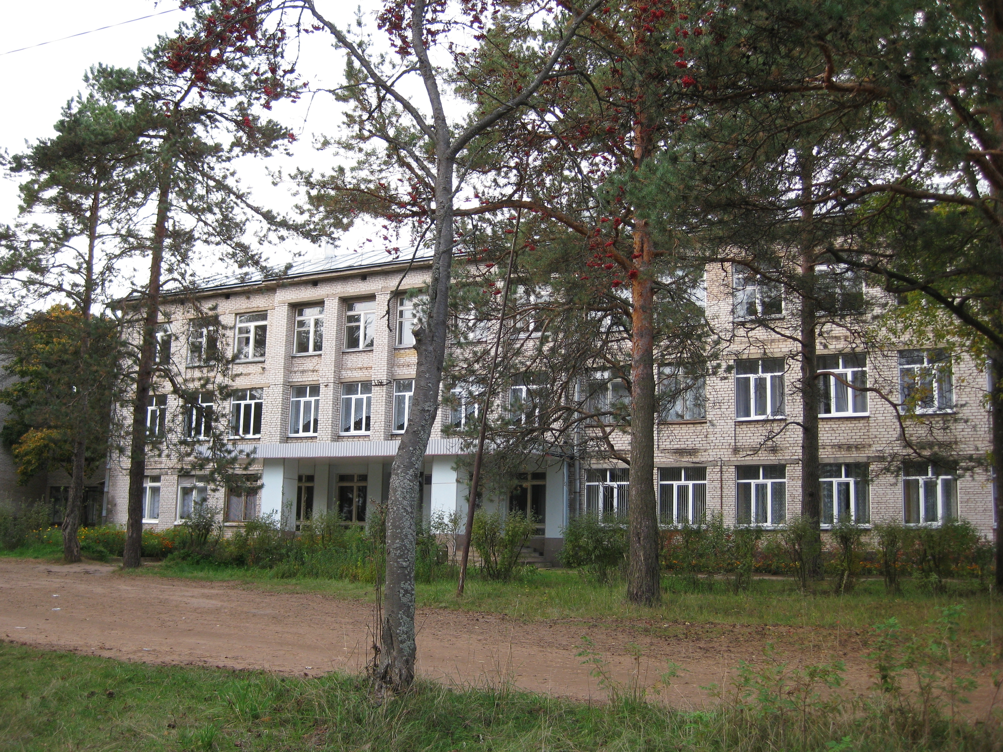 Будогощская средняя школа